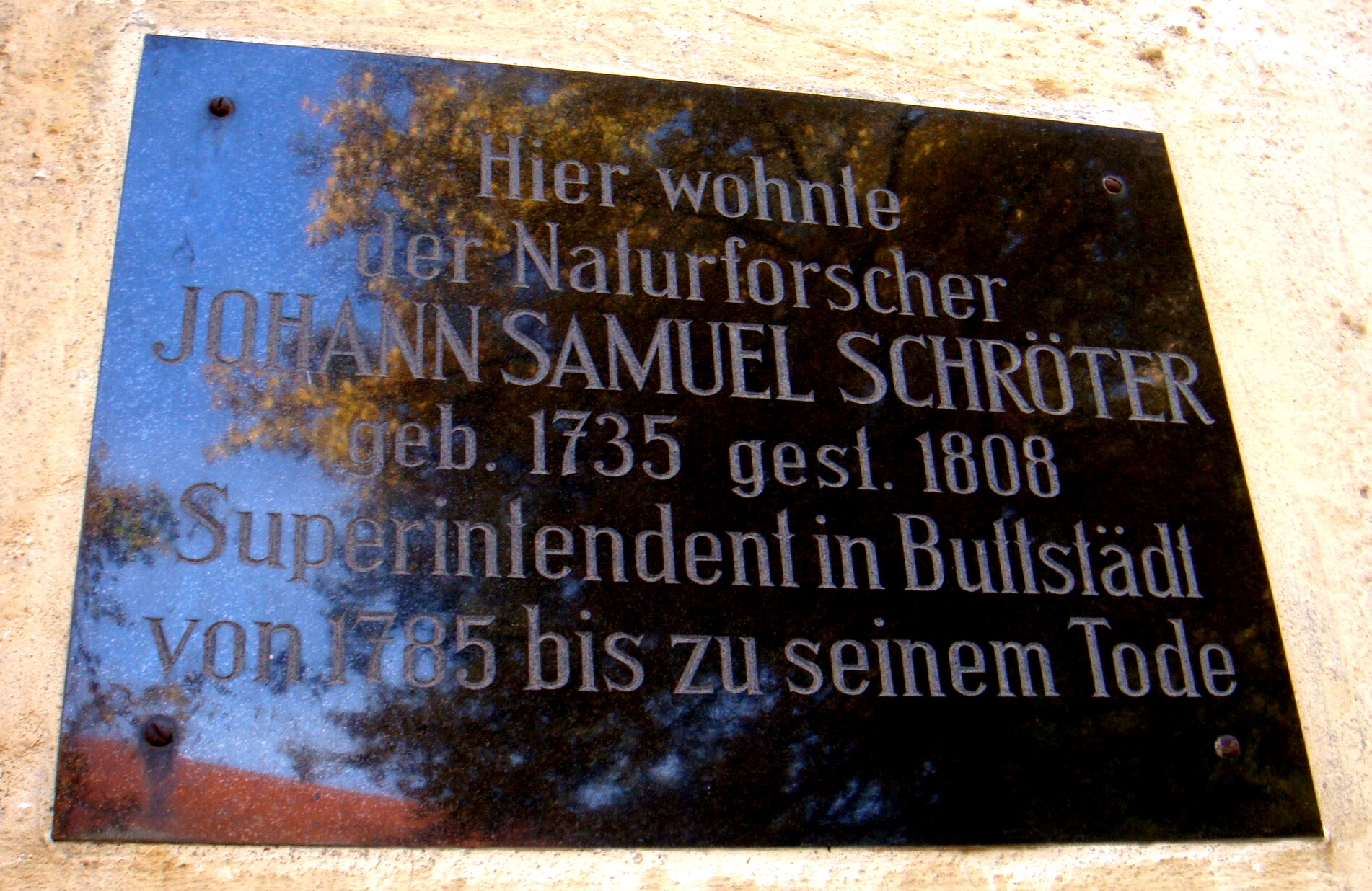 Gedenktafel an der Superintendentur Buttstädt